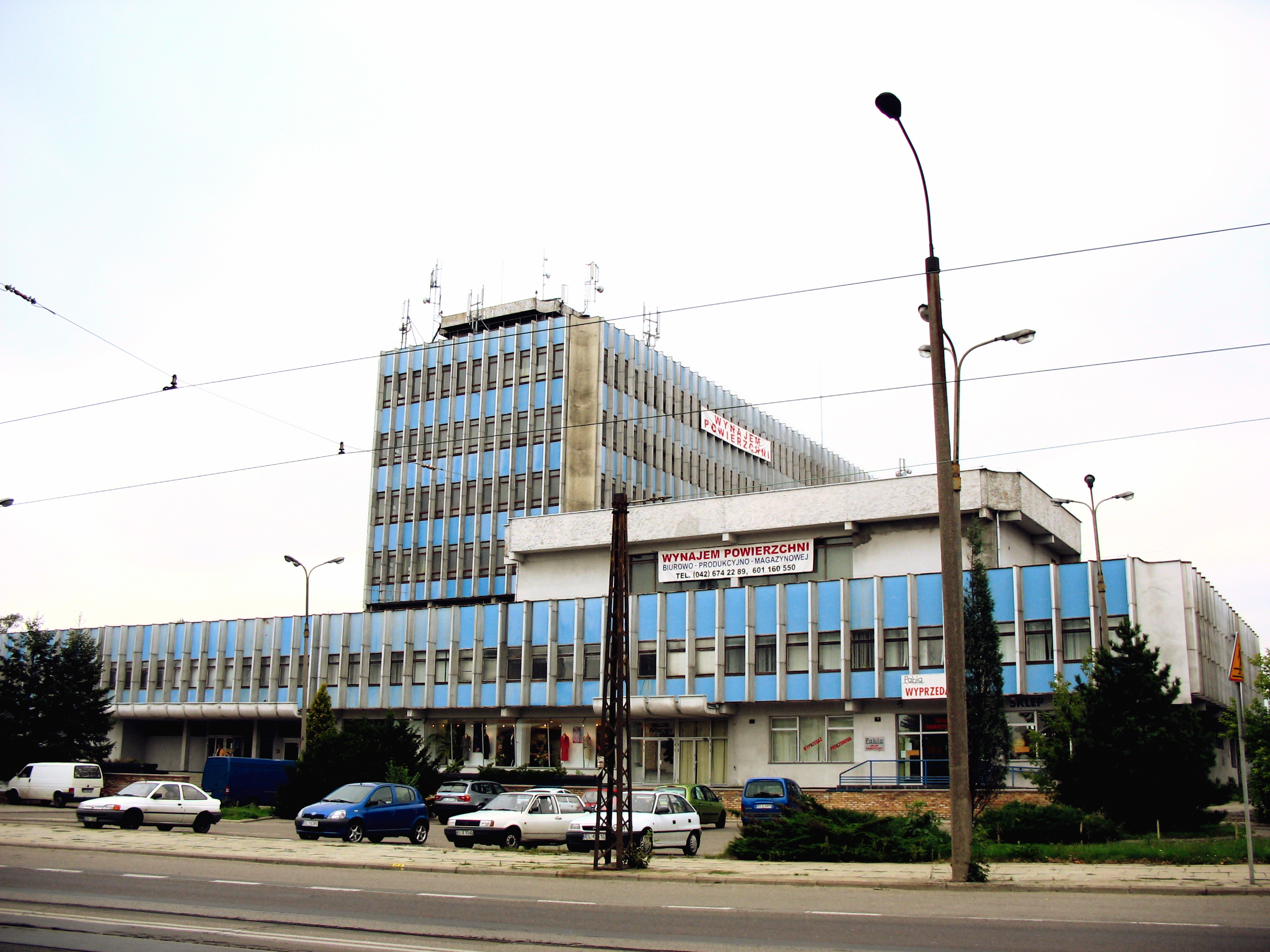 Pabianice, ul. Warszawska - budynek dawnych zakładów odzieżowych "Pabia"